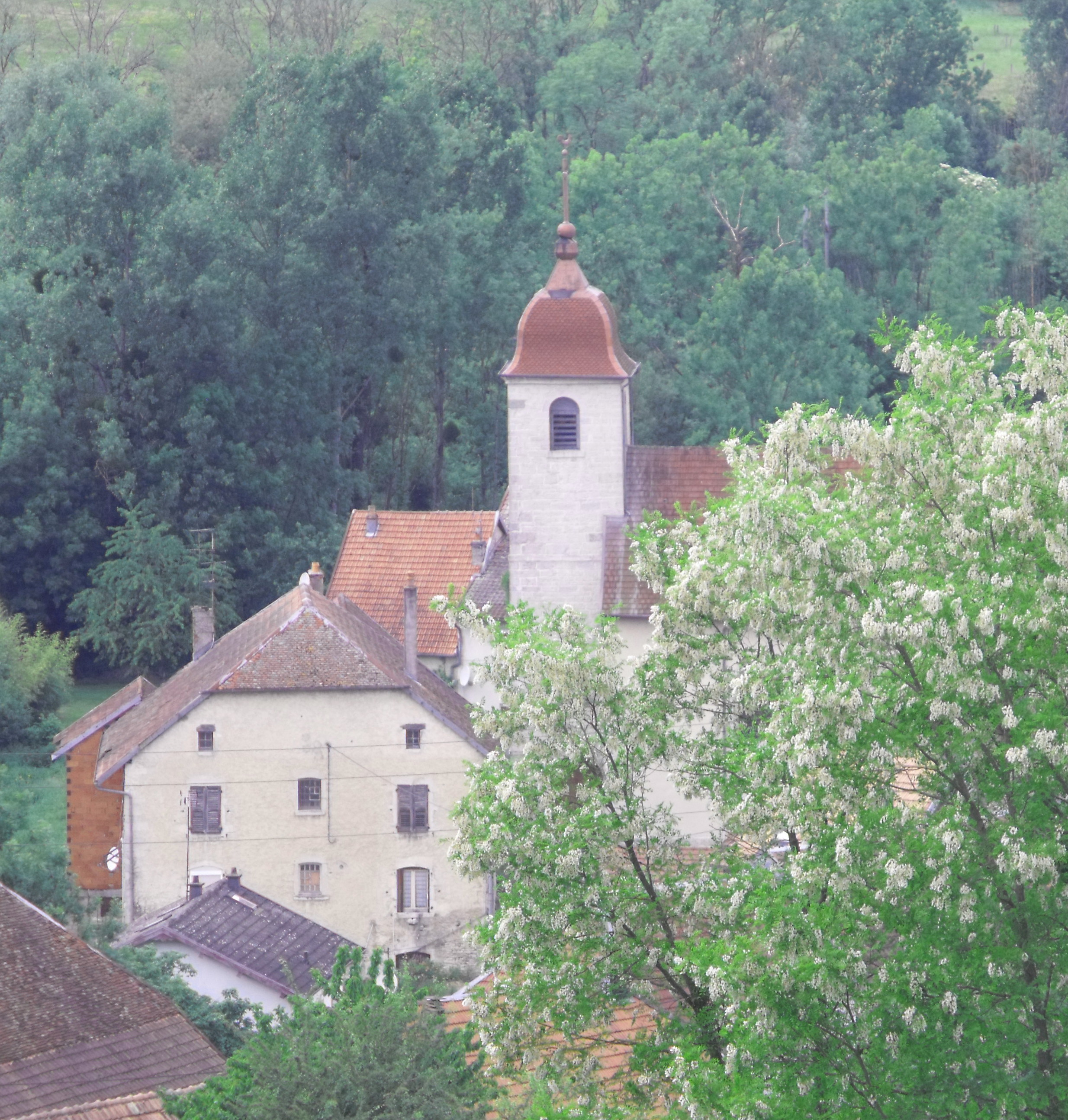 Eglise de Rang, Doubs, France